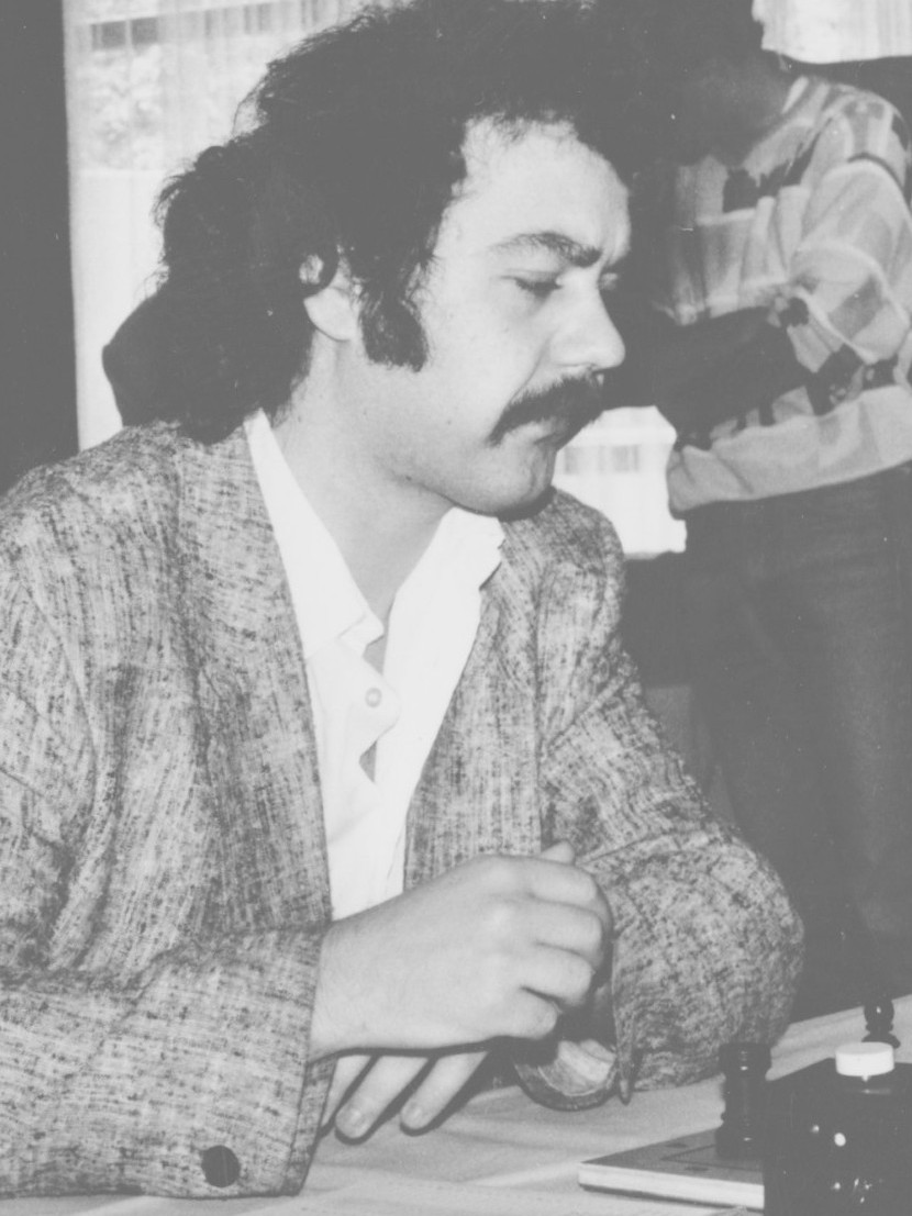 Klaus-Jürgen Schulz, Deutsche Schacheinzelmeisterschaft 1987 in Bad Neuenahr